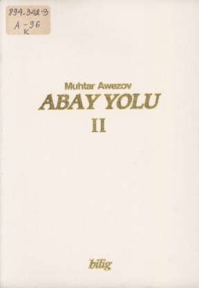 Kitabın kapağı